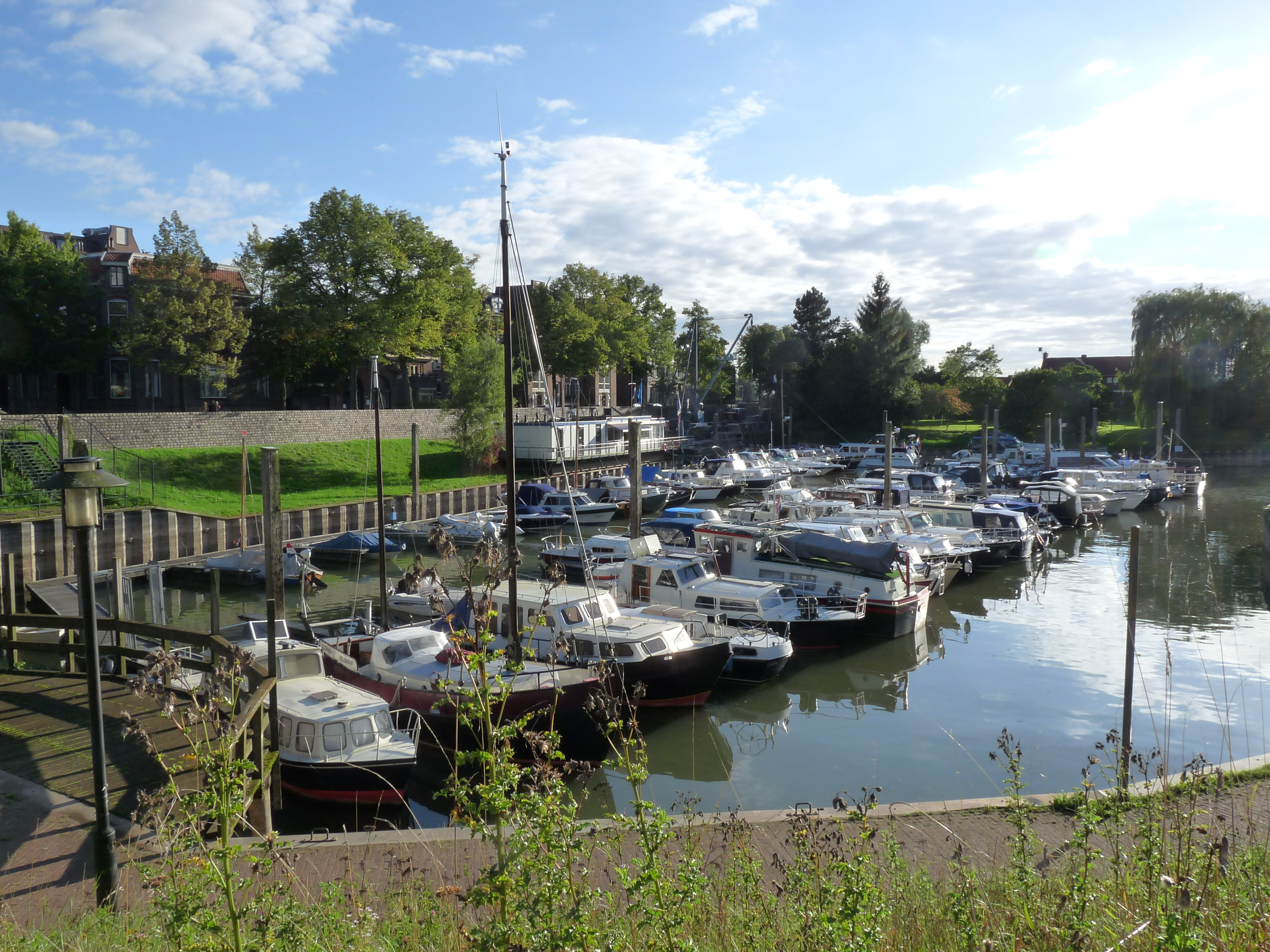 Marinahaven van Zutphen